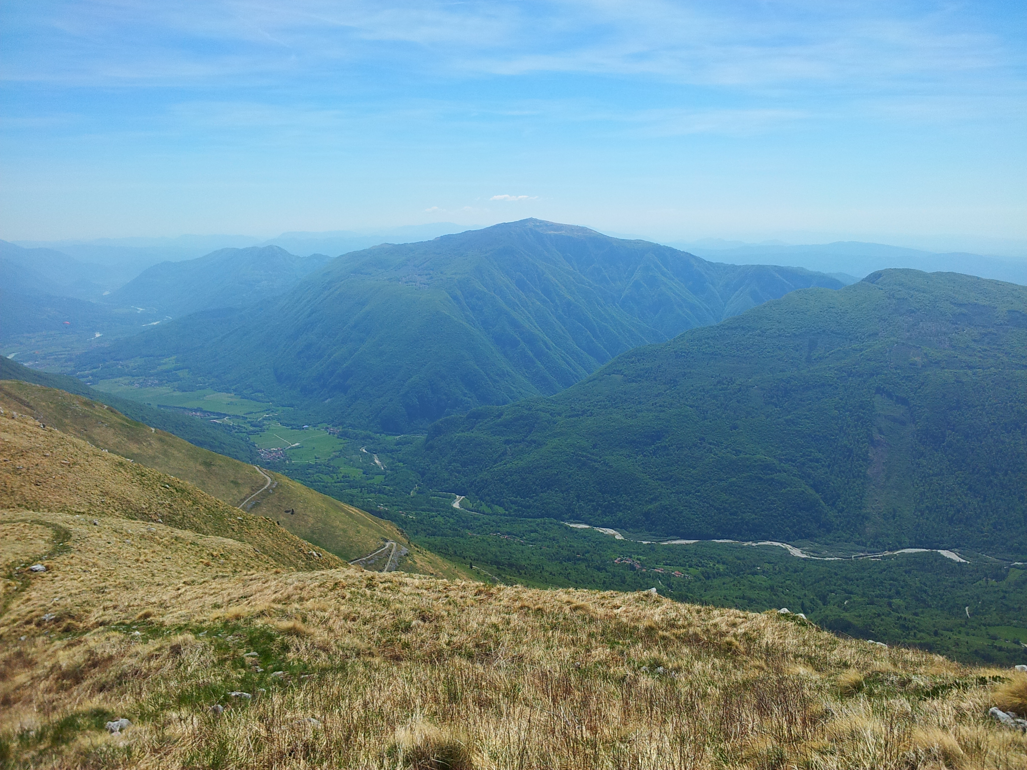 Pogled na Matajur z vrha Stola.